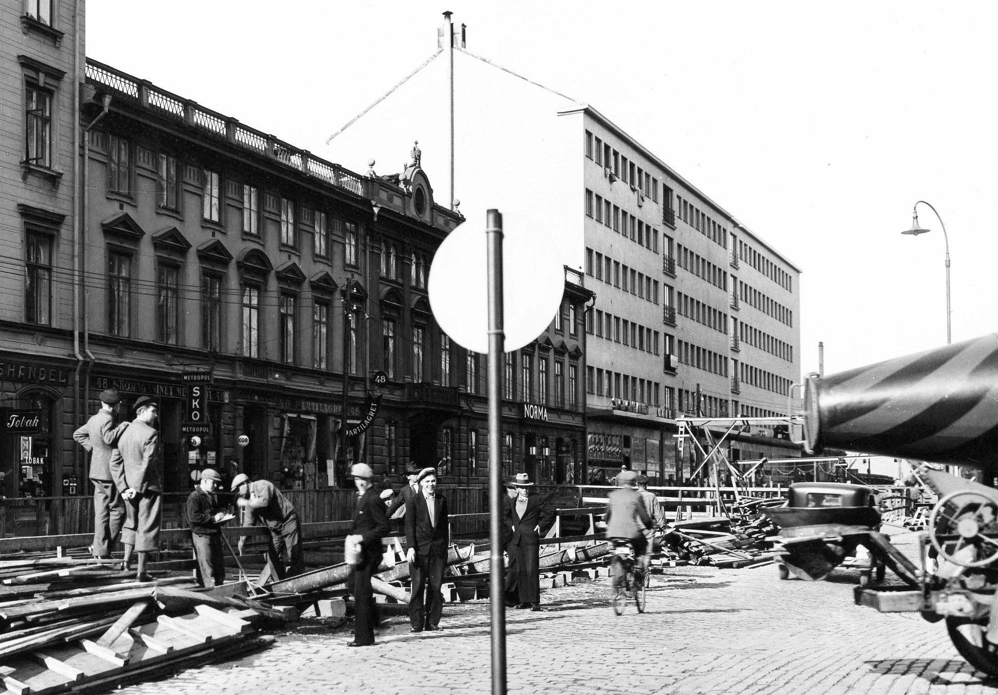 Här byggs Katarinatunneln, Kvarteret Nattugglan med Paul Hedqvists nya bostadshus i bakgrunden.